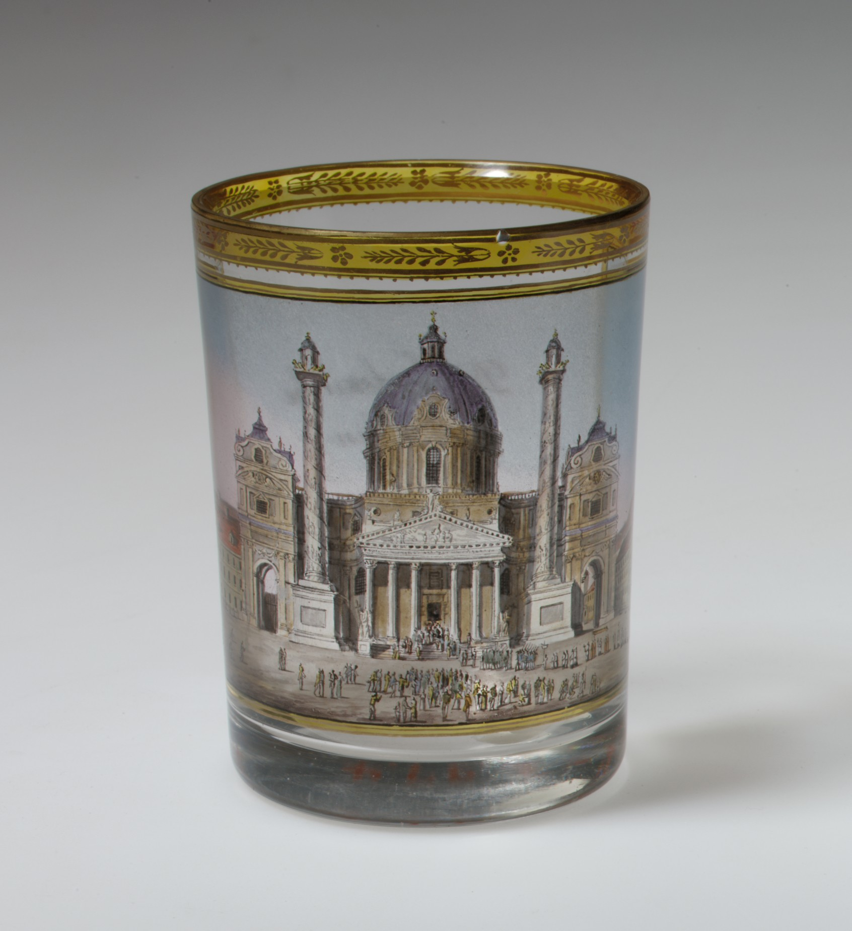 Austrian, Vienna; Beaker; Glass